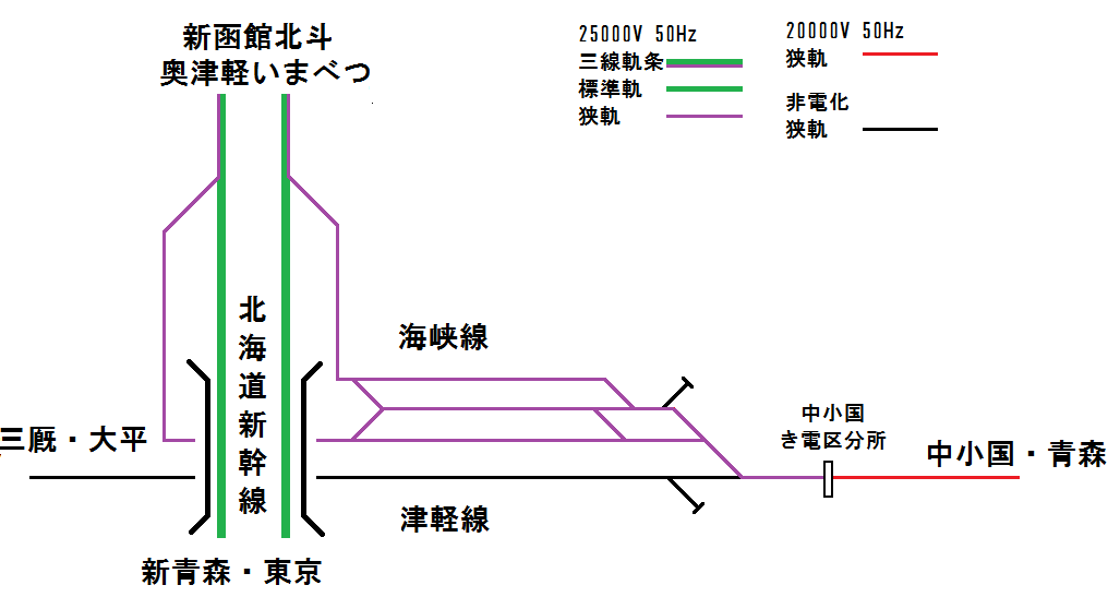 北海道新幹線開業後の新中小国信号場周辺の配線